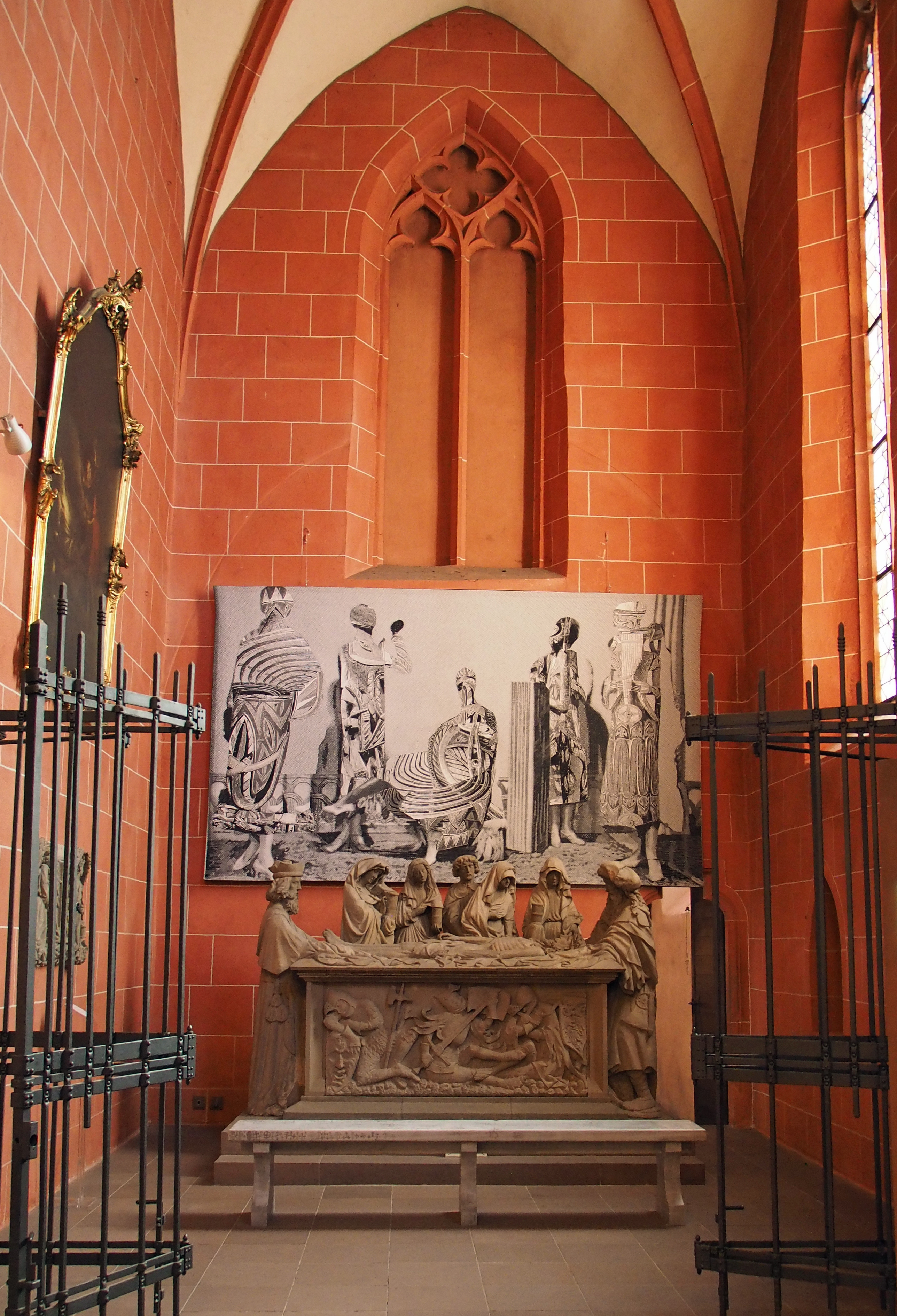 Heiliges Grab von 1453 in der Magdalenenkapelle im Kaiserdom St. Bartholomäus Frankfurt/Main